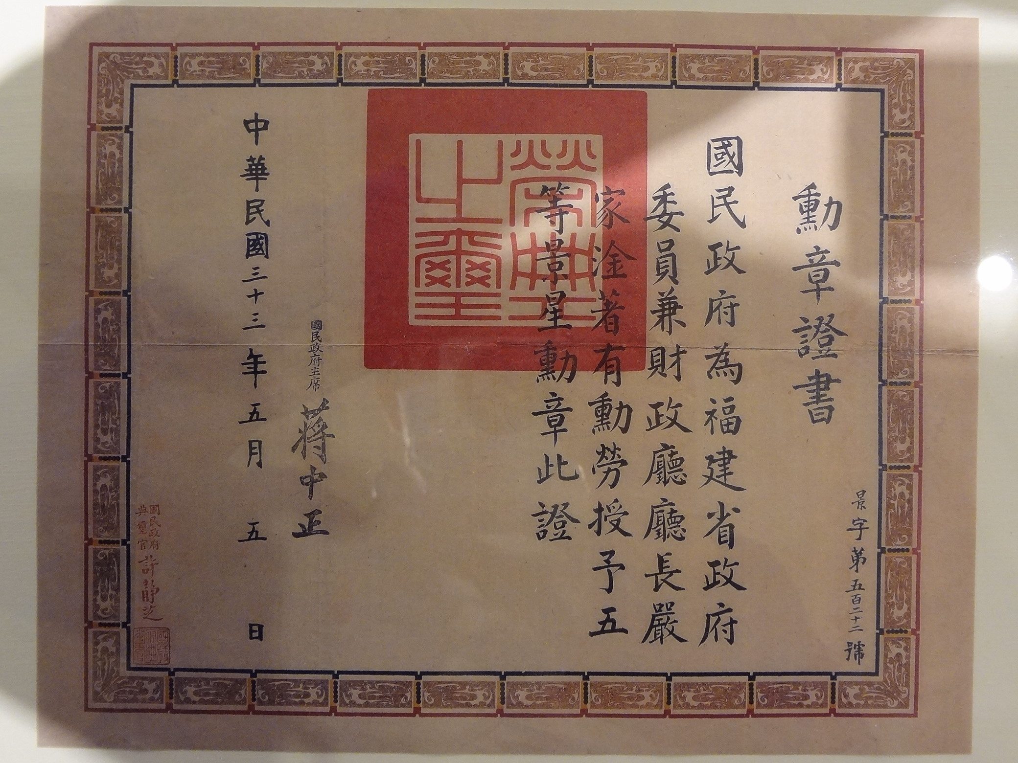 1944年5月5日中華民國國民政府勳章證書，授予福建省政府委員兼福建省政府財政廳廳長嚴家淦五等景星勳章，上方蓋印榮典之璽。